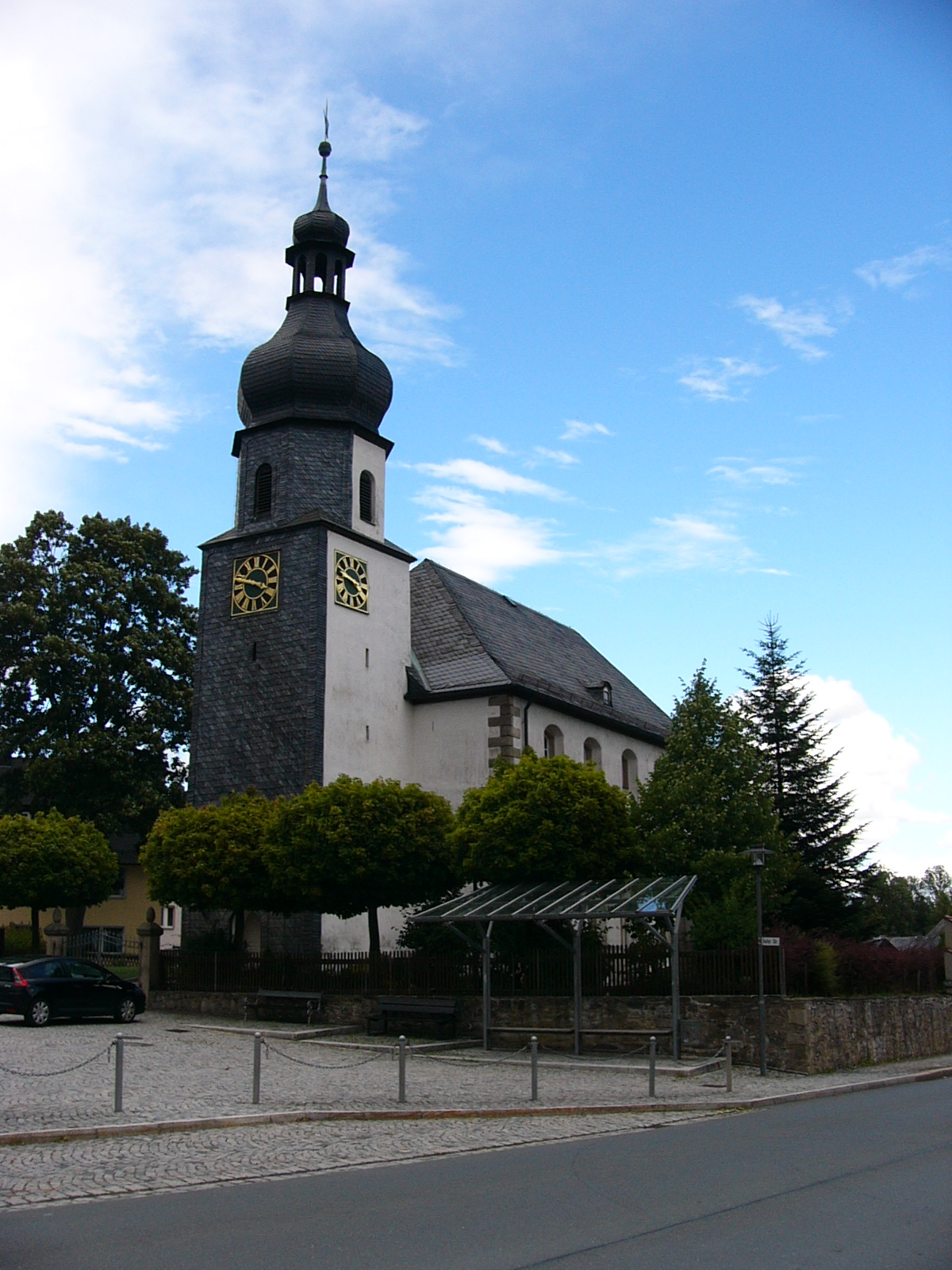 Pfarrkirche Konradsreuth